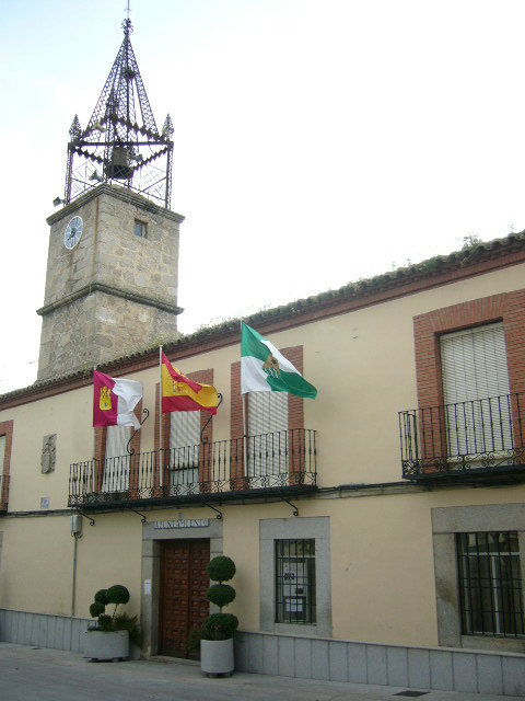 Fachada del Ayuntamiento de Menasalbas